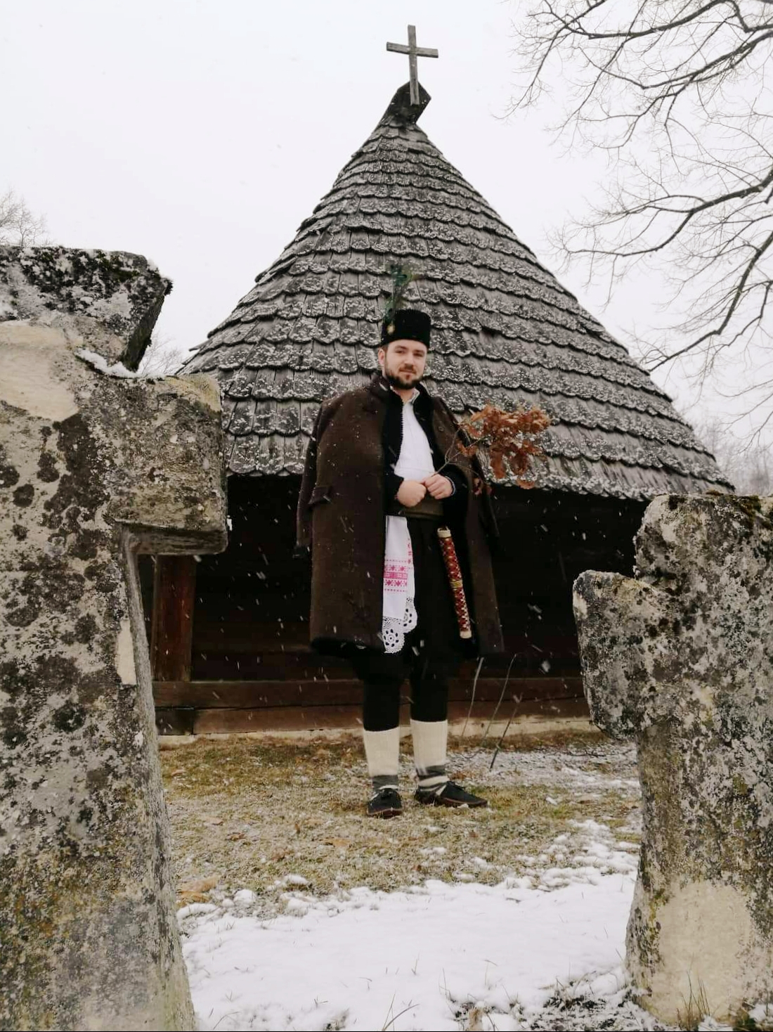 Narodno ruho gradiškog kraja pred brvnarom u Romanovcima. O Božiću 2019. godine.